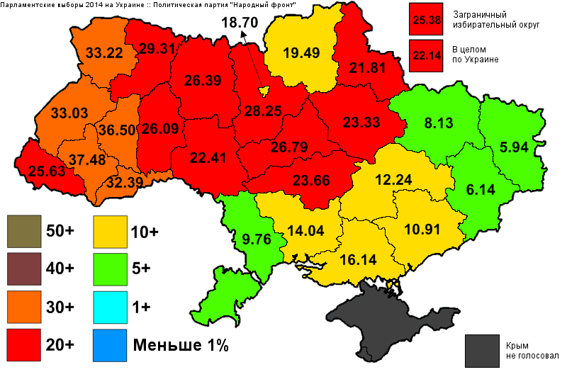 Результаты выборов в Верховную Раду Украины, которые состоялись 25 октября 2014 года. Информация с официального сайта ЦИК. Проценты по регионам для блока "Народный фронт".